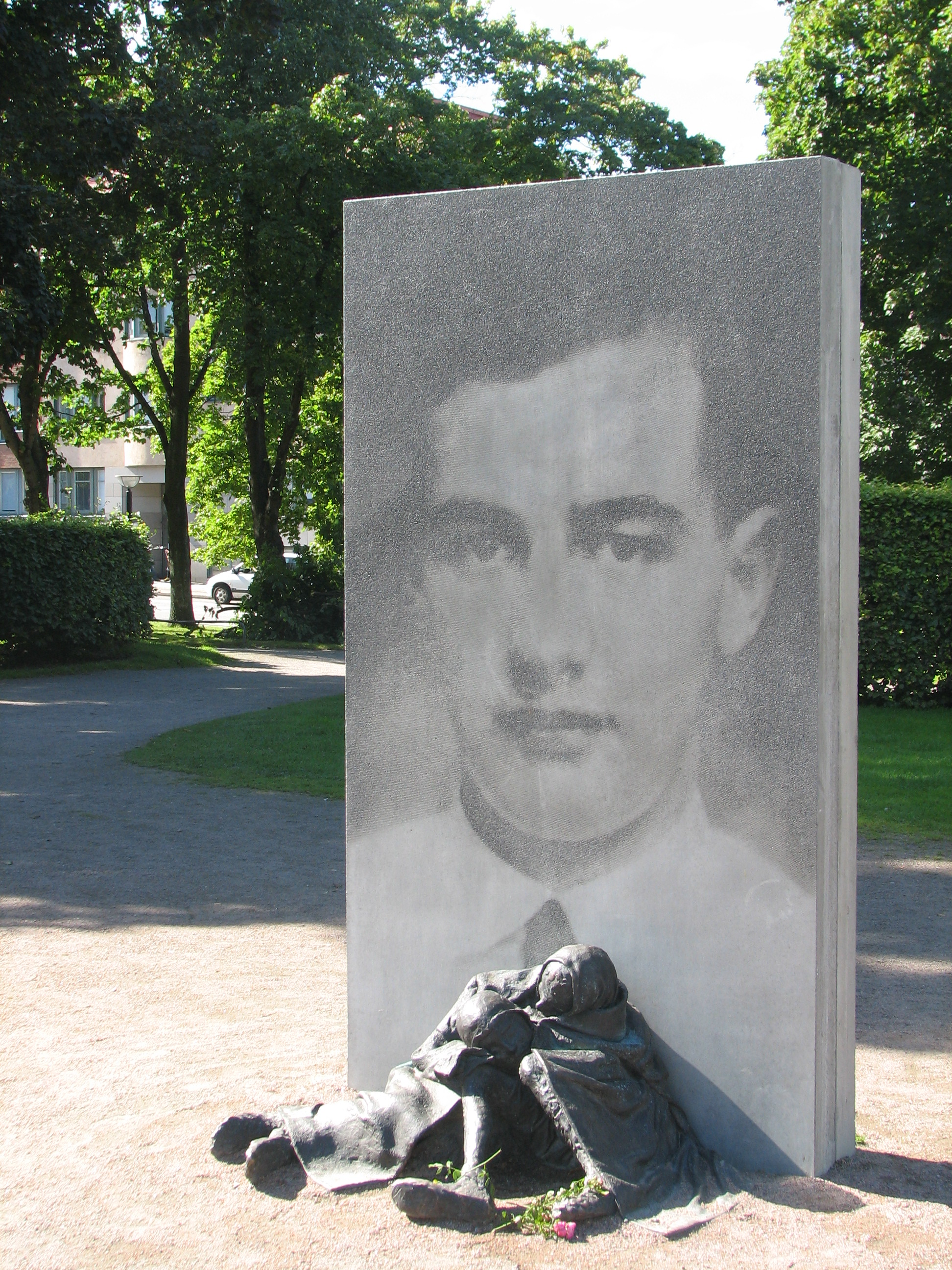 The Raoul Wallenberg memorial by Charlotte Gyllenhammar at Haga Kyrkoplan in Göteborg, Sweden.